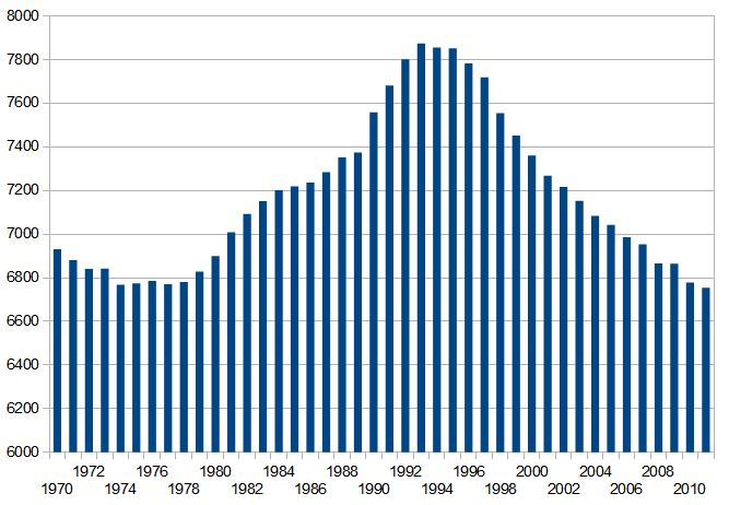 Inarin asukasluvun kehittyminen vuosina 1970-2011.